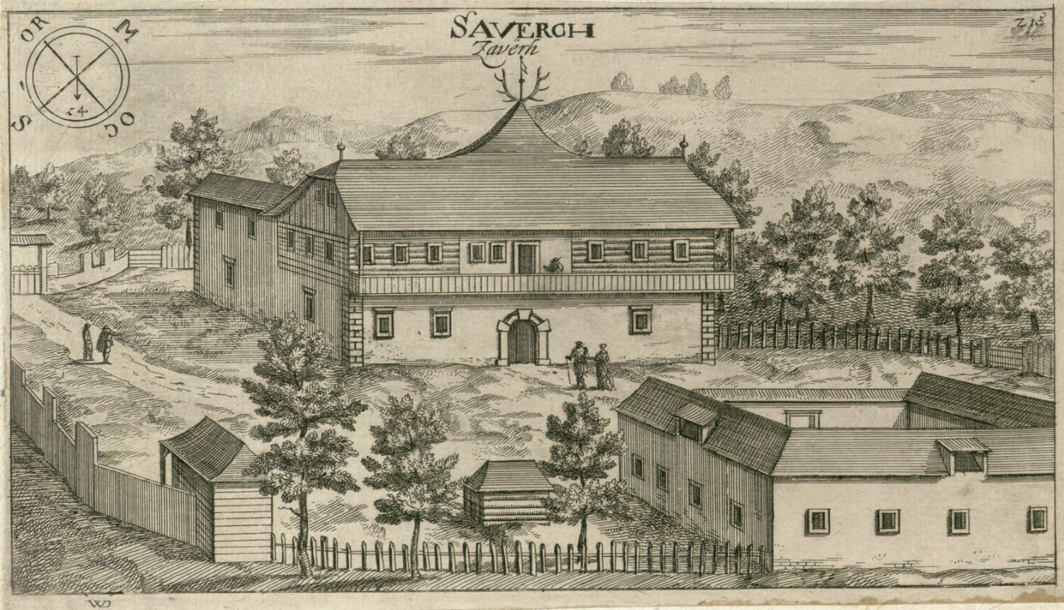 Dvorec Zavrh